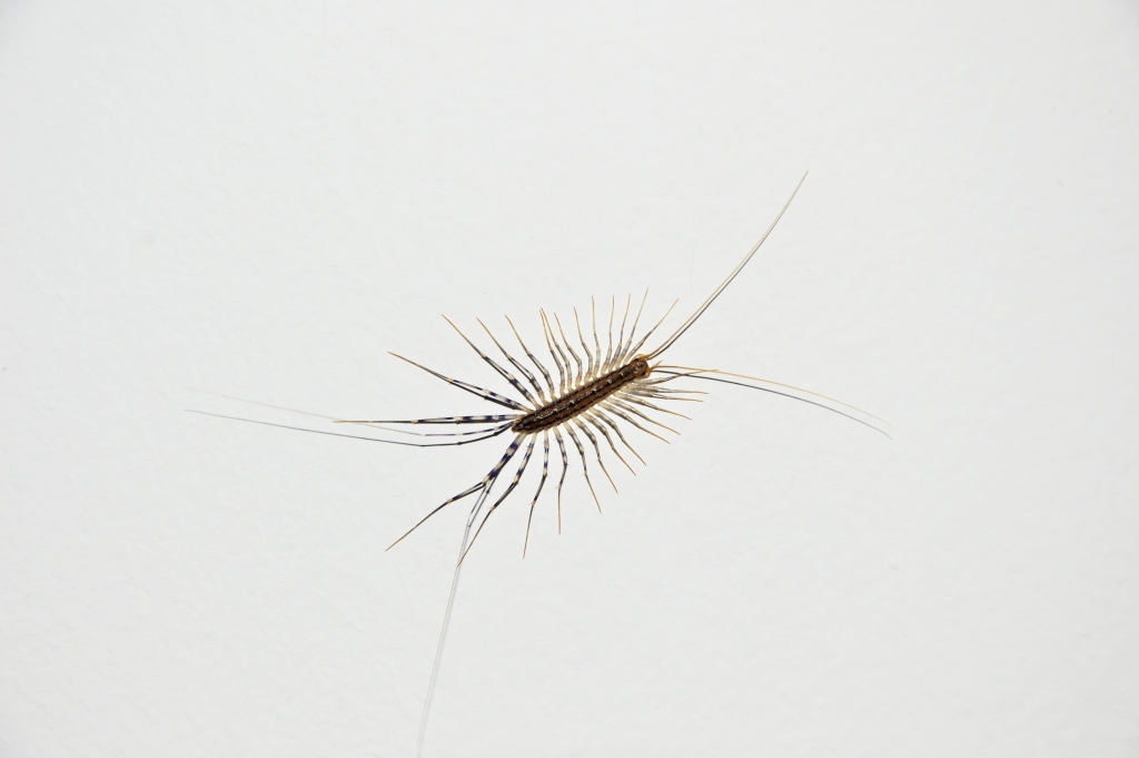 Štitonosna štriga na zidu